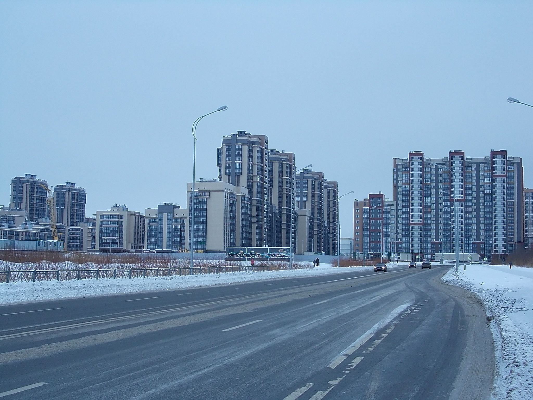 Вид на улицу и дома микрорайона «Балтийская жемчужина» от проспекта Героев